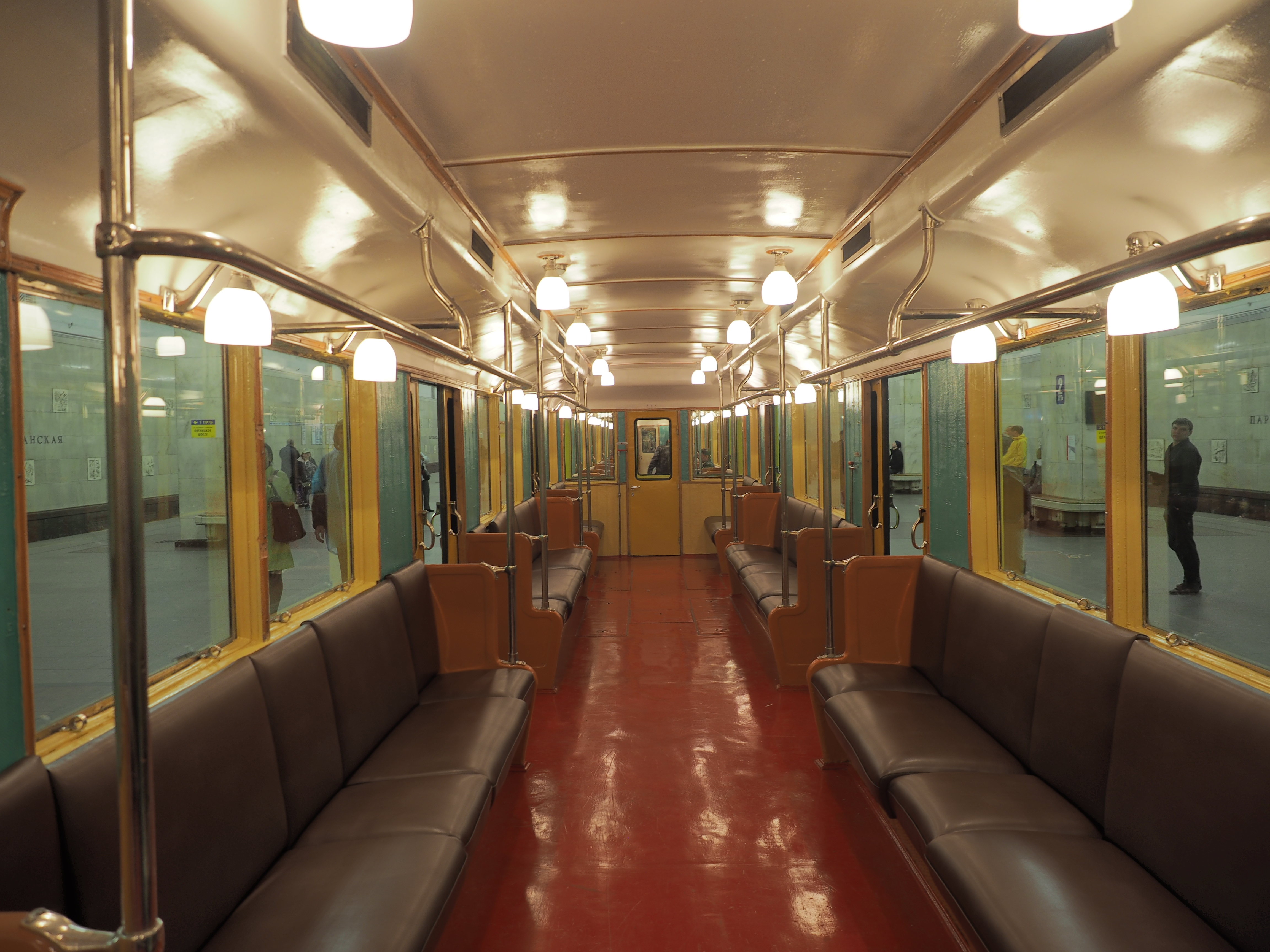 Музейный метровагон А 1. Выставка подвижного состава и парад поездов к 80-летию Московского метрополитена 15 мая 2015 года. On May 15 and 16, 2015, Moscow Metro celebrated its 80th anniversary. For the first time, recently restored historical cars were exhibited at the siding track of Partizanskaya station. 15 и 16 мая 2015 в Москве отмечалось 80 лет Московскому метро. Впервые была устроена выставка исторических вагонов. Они были расставлены на 3 пути станции Партизанская.